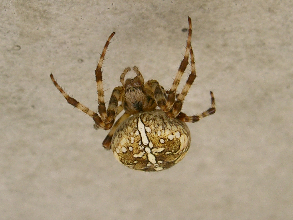 Korsedderkopp, Araneus diadematus, August 2004